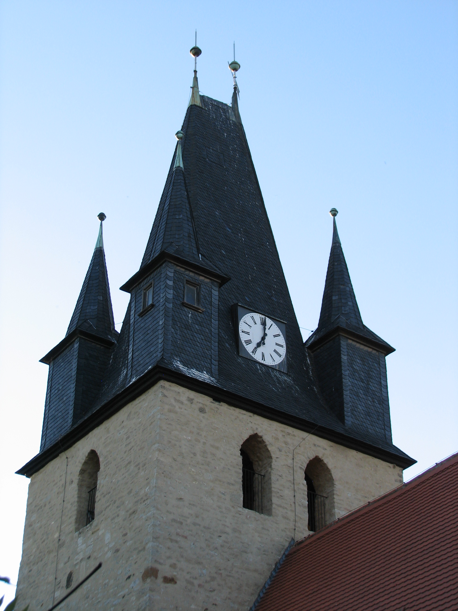 St. Petri Kirche Brumby mit ihren markanten fünf Türmen